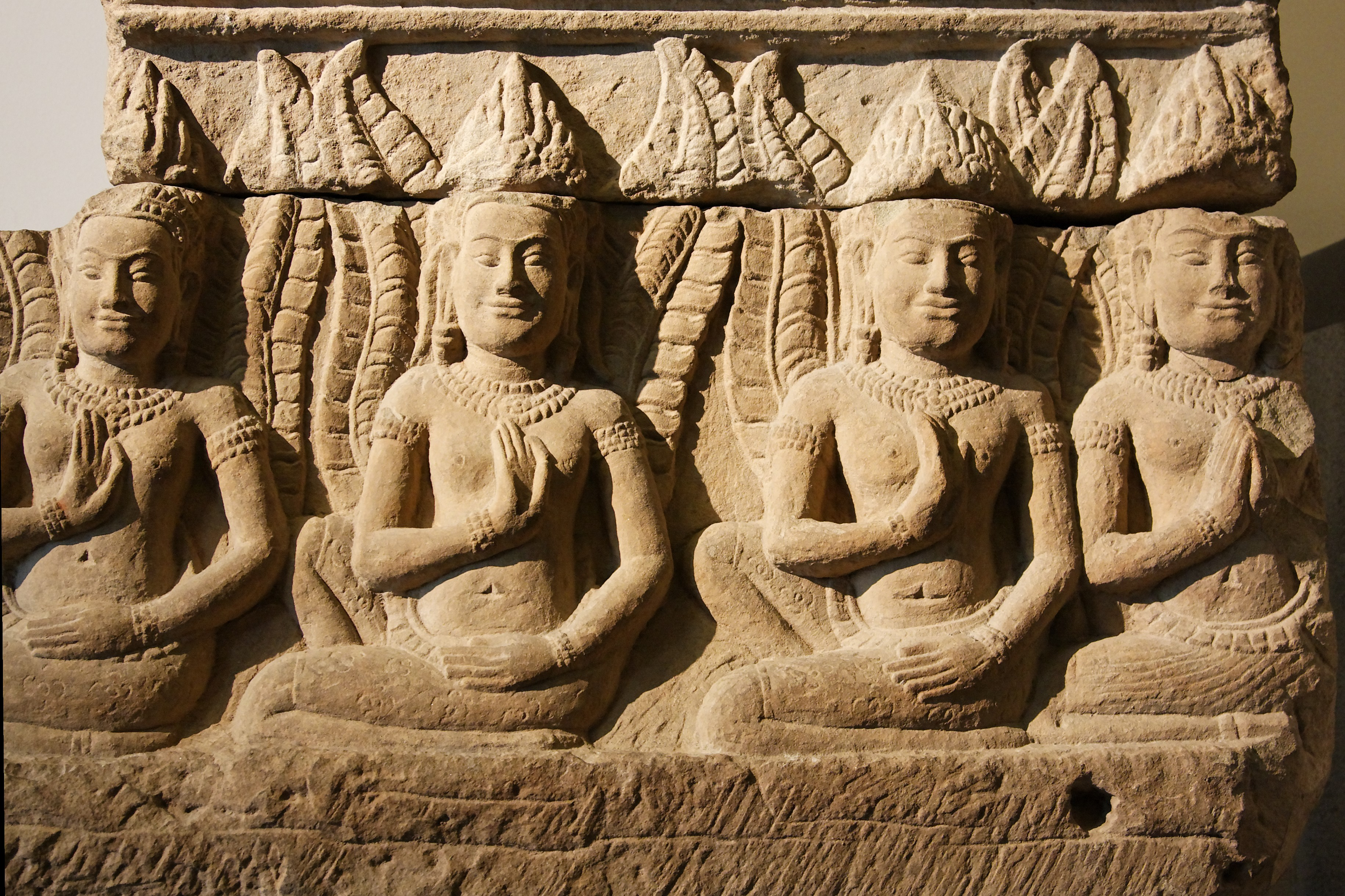 Kinnari, Cambodge, terrasse des éléphants (Angkor Thom), style du Bayon, fin XIIème, début XIIIème siècles, grès. Musée Guimet, Paris